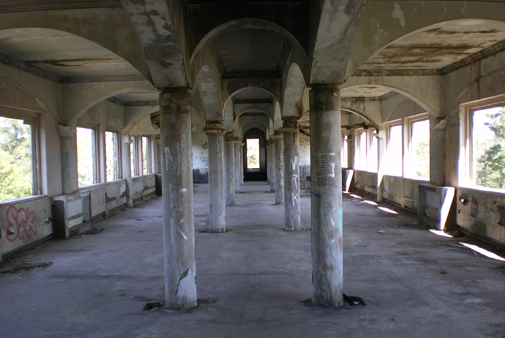 Hotel que servia o complexo turístico do Muxito